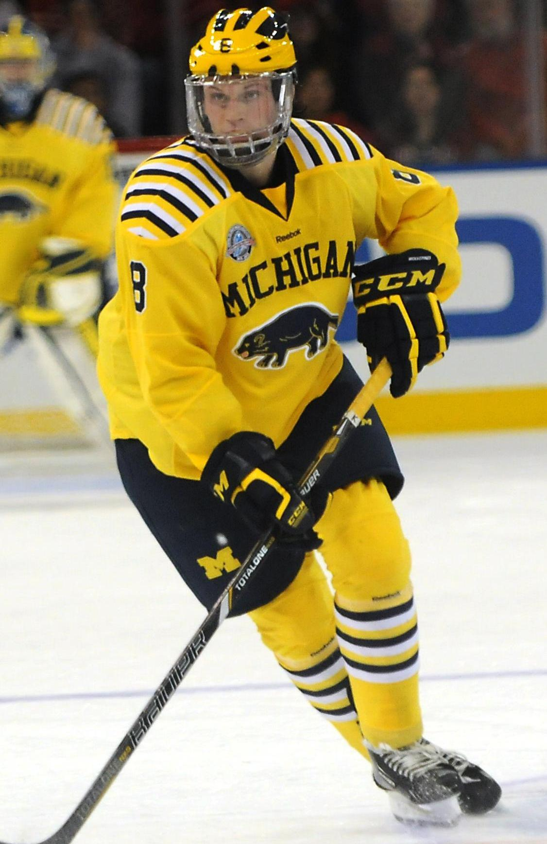 Защитник «Мичиган Волверин» Джейкоб Троуба во время матча чемпионата NCAA против «Корнелл Биг Ред» 24 ноября 2012 года.